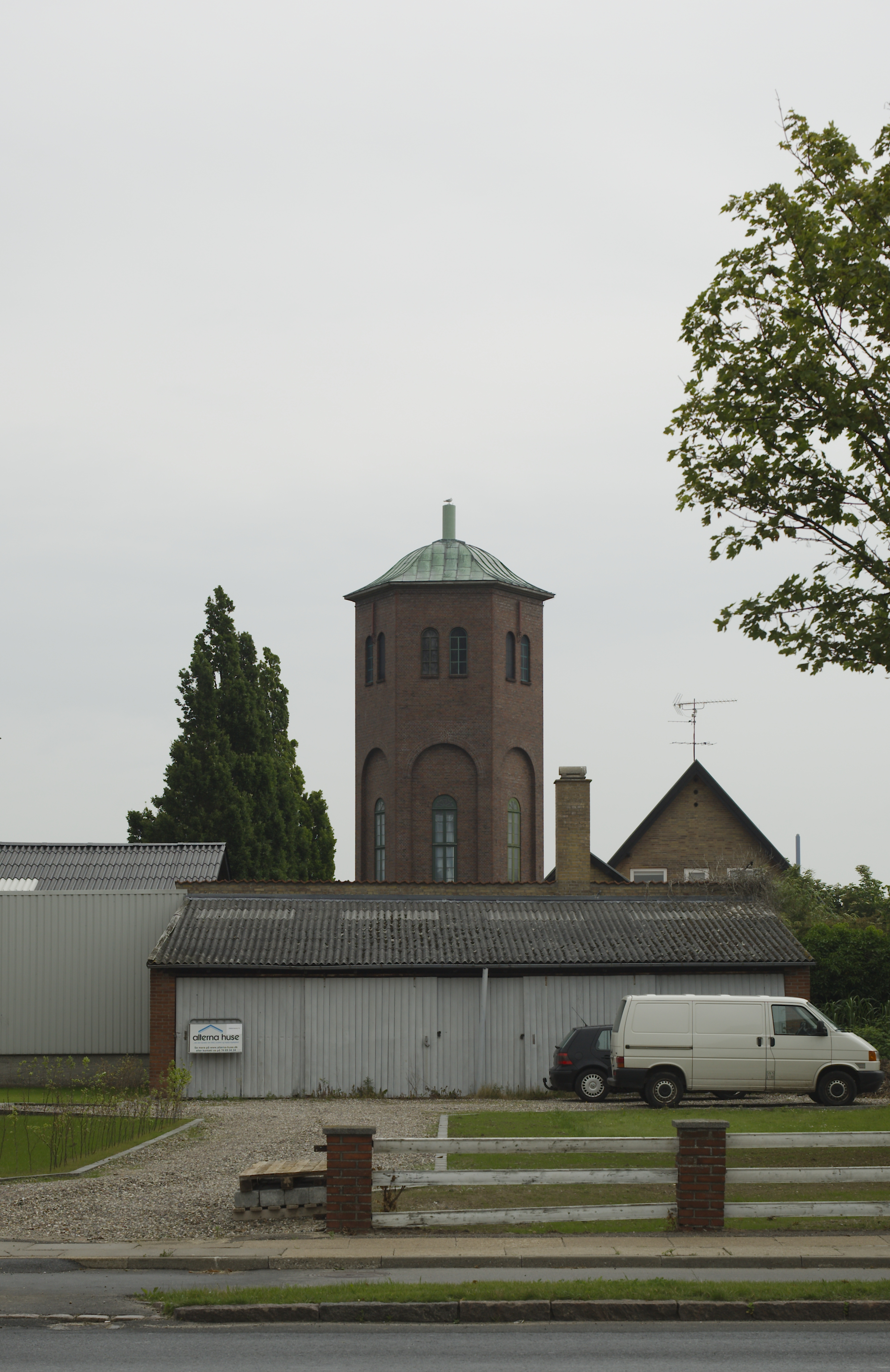 Redstedsgade vandtårn, Sønderborg